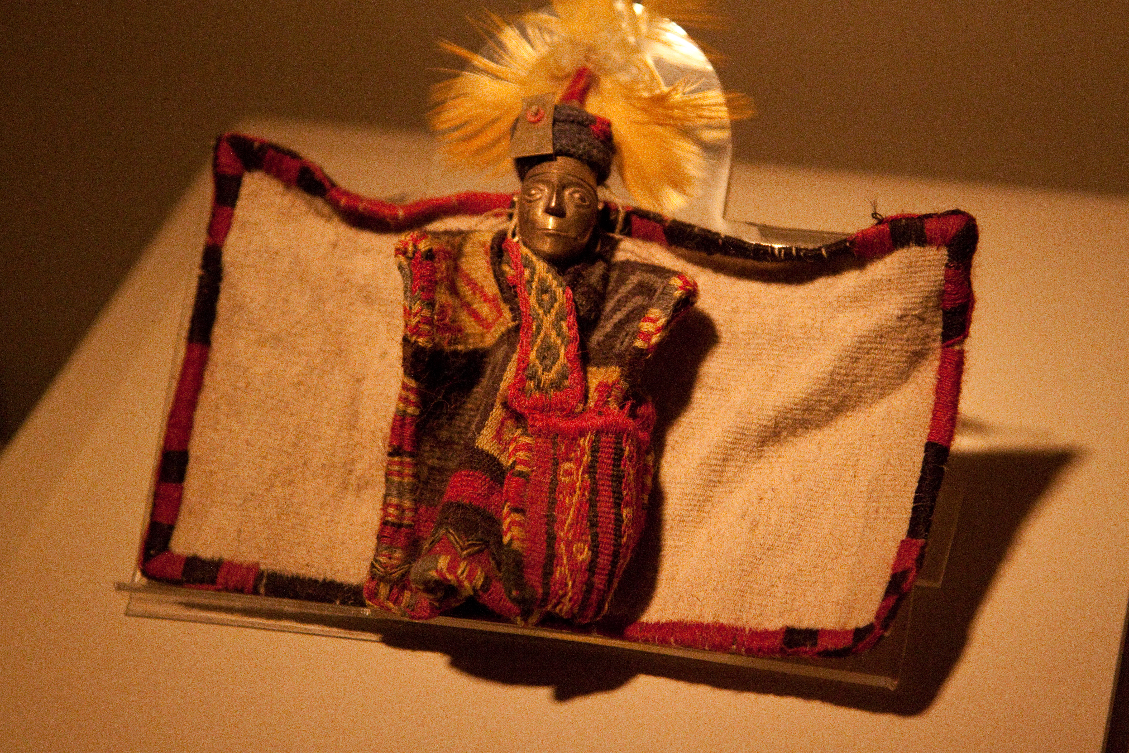 Ajuar momias del Llullaillaco. Salta. Argentina